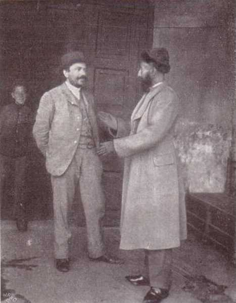 Fur Traders in Nizhny Novgorod. Rauchwaren- (Pelz-)Kommissionär und Großhändler auf der Messe zu Nischny Nowgorod.